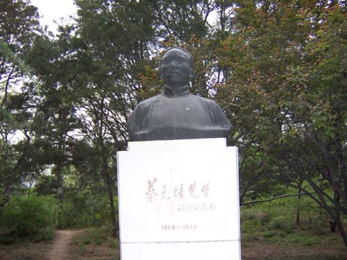 北京大学校园内的zh:蔡元培像，由Mountain自己拍摄。